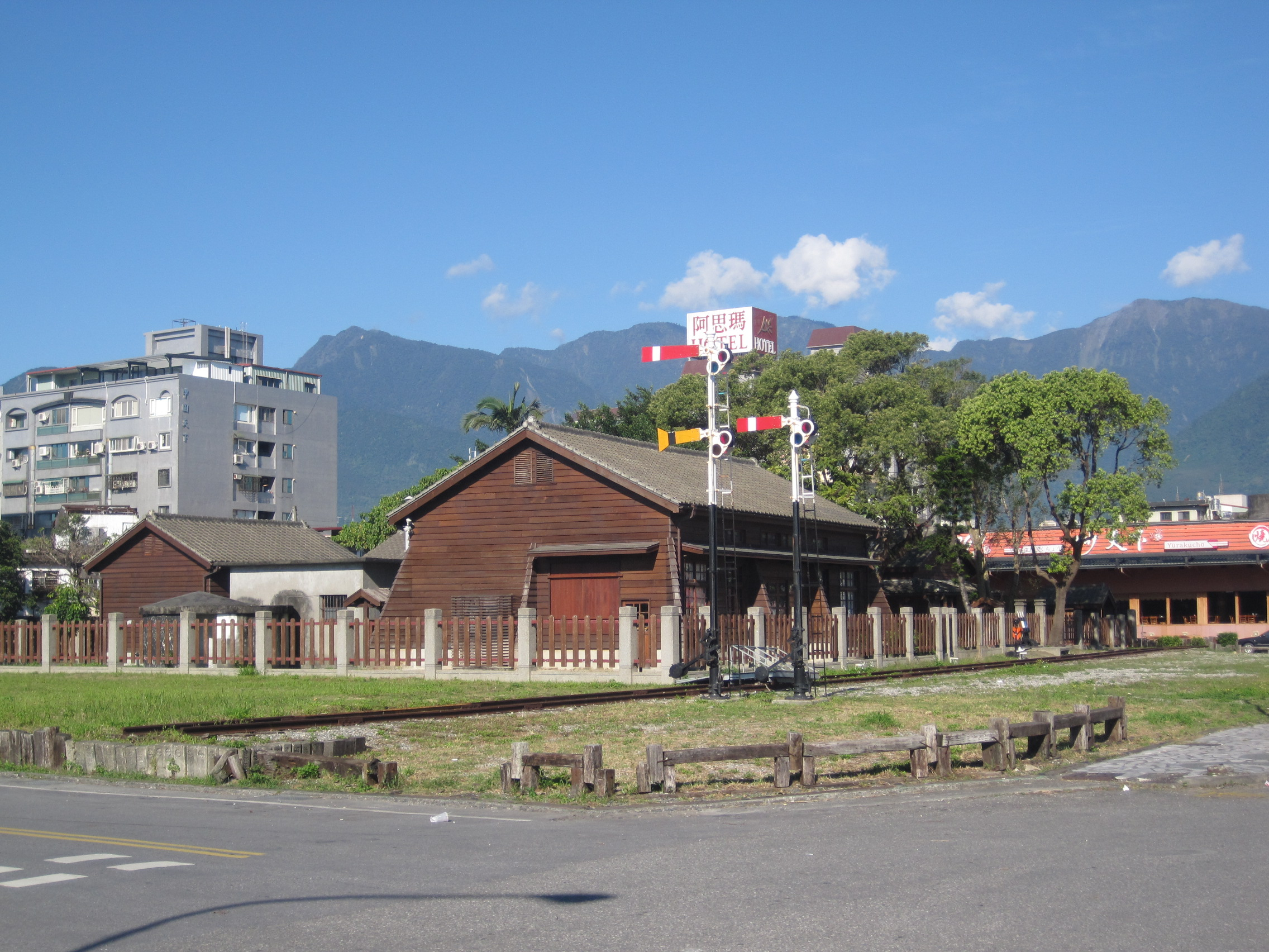 東線鐵道遺址舊警務段